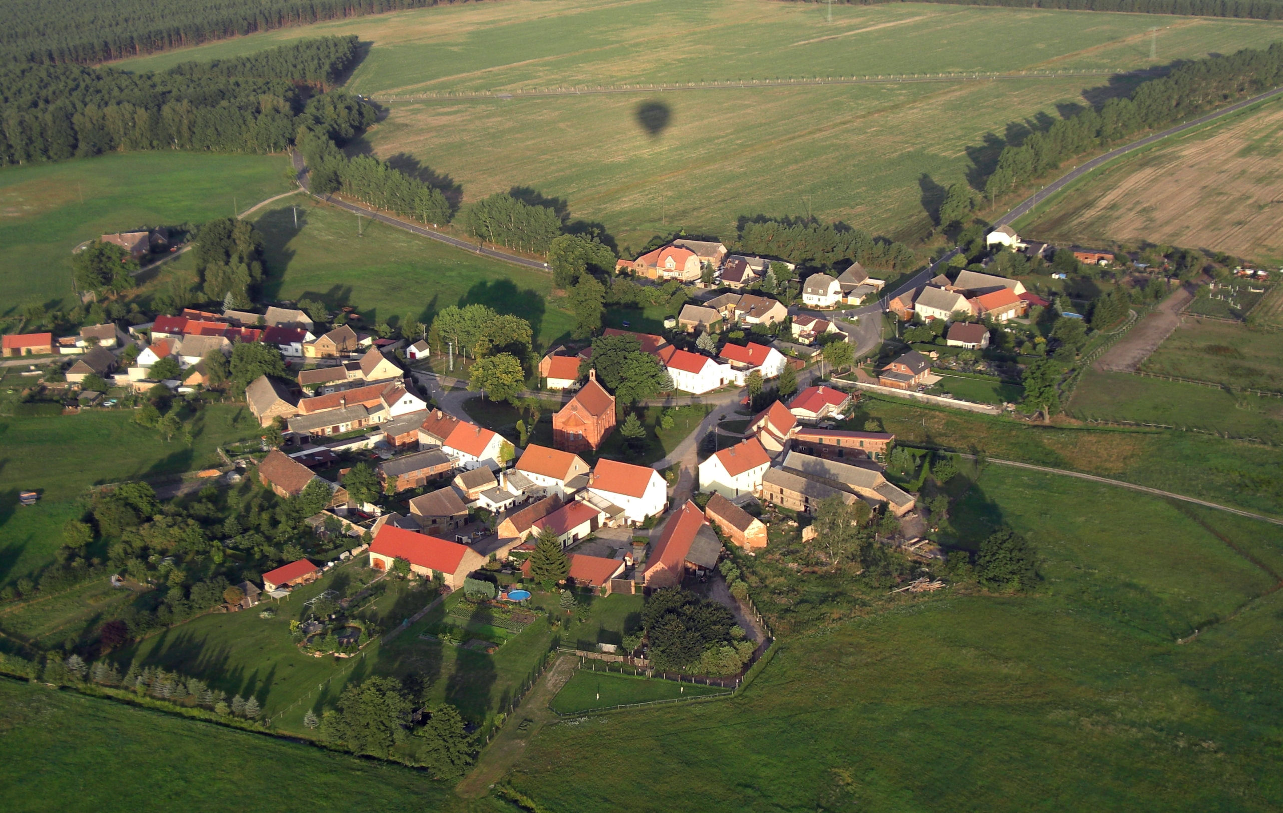 Liebätz